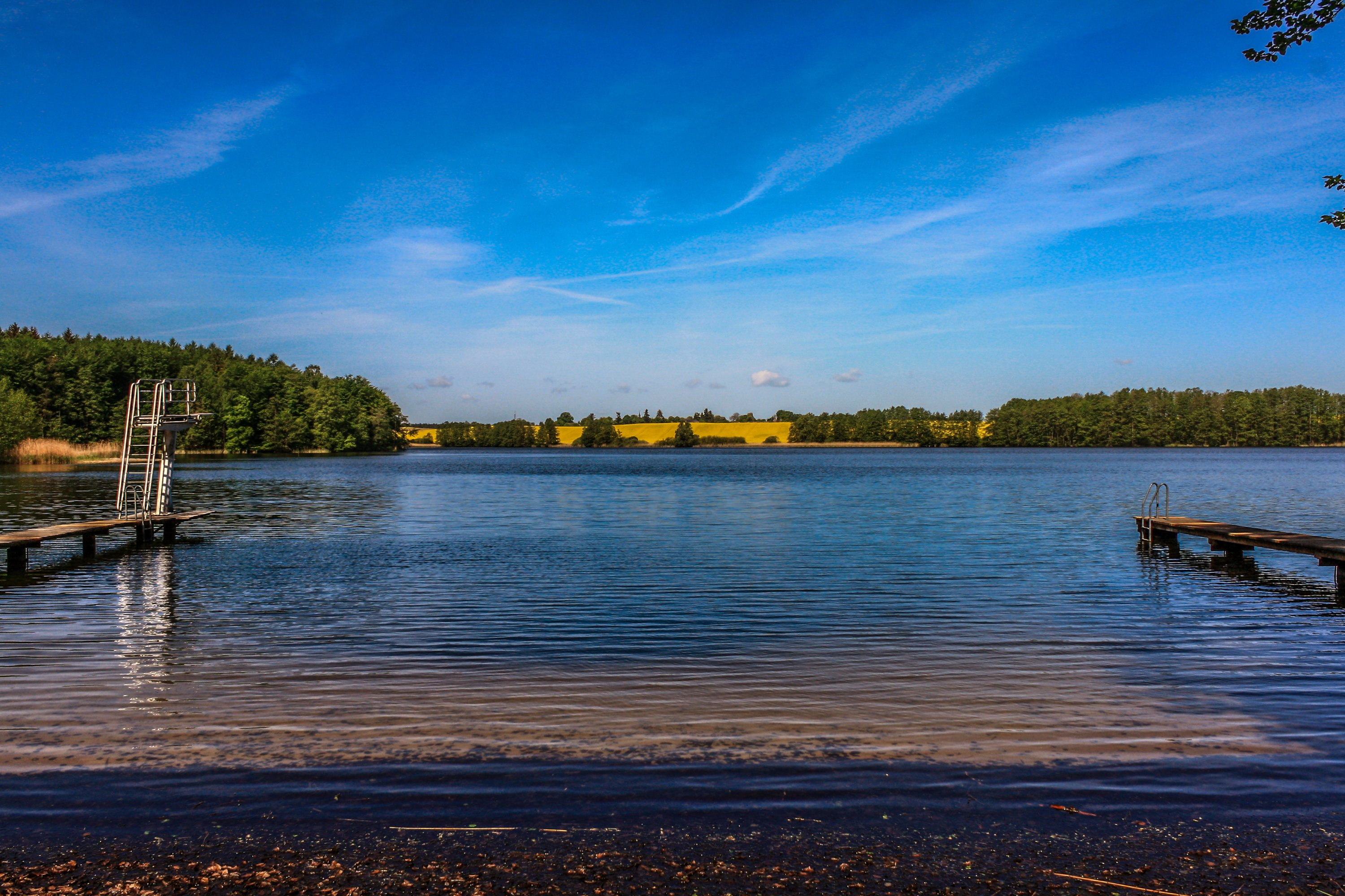 Schumellensee im Boitzenburger Land